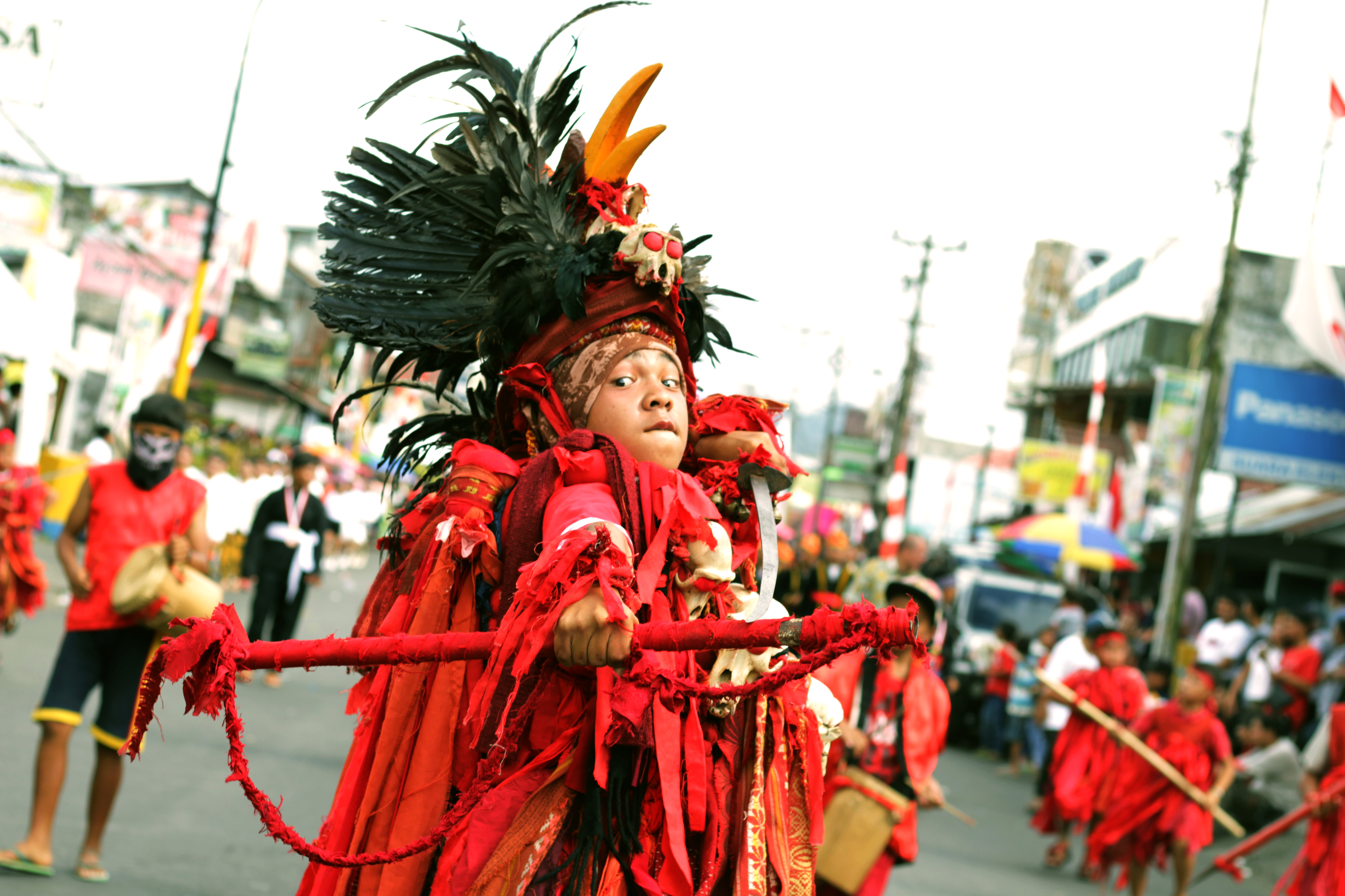 Tarian "Kabasaran" adalah salah satu budaya yang ada di Indonesia, tepatnya Sulawesi Utara. Tarian milik suku Minahasa ini, dulunya dikenal sebagai tarian perang, gunanya untuk menghalau para musuh yang datang ke daerah mereka. Saat ini, tarian Kabasaran menjadi ikon budaya Minahasa dan Indonesia, yang sering kali ditampilkan pada acara besar, penyambutan tamu dan juga pada acara kebudayaan.